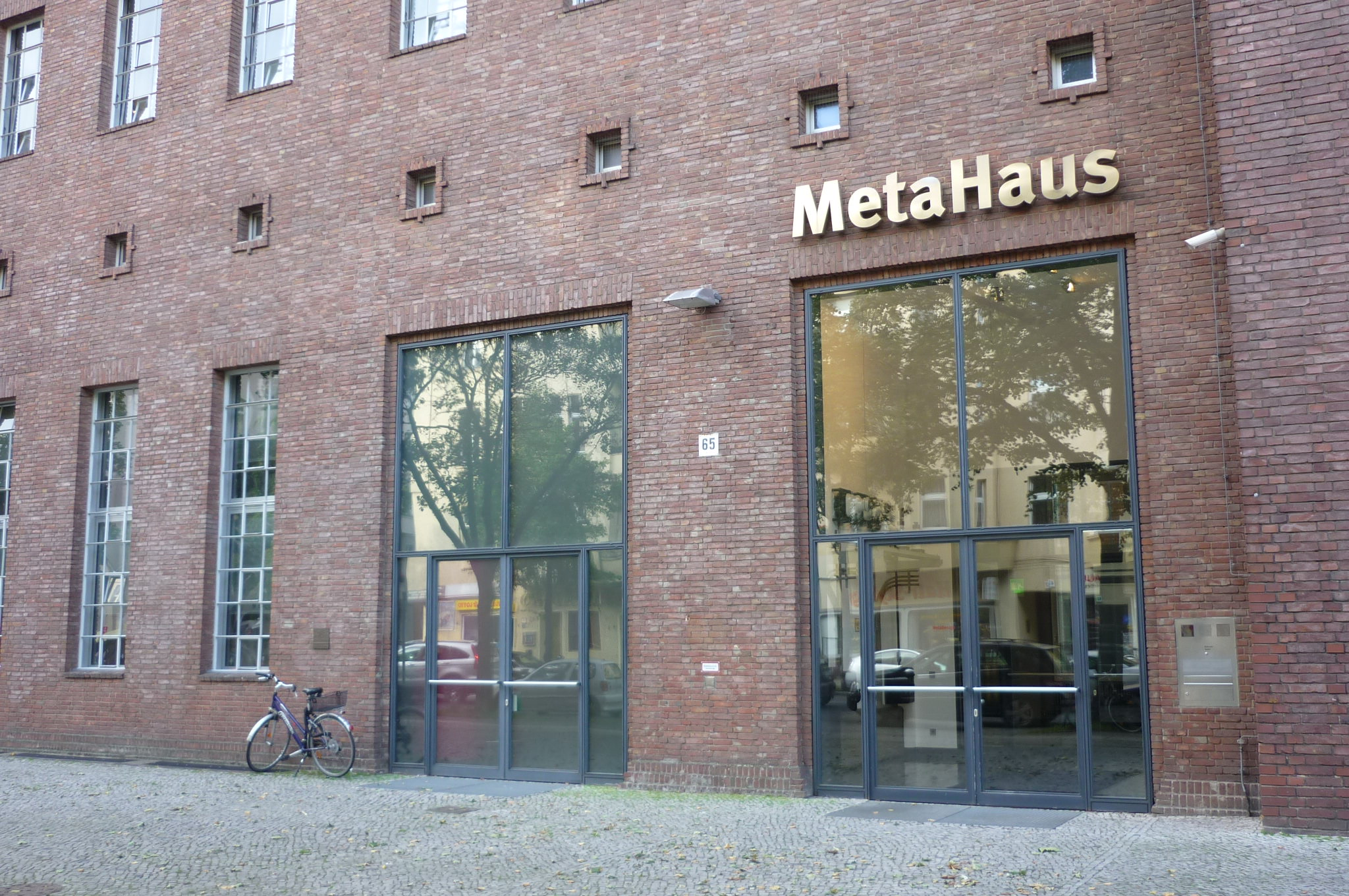 Eingangsbereich des Metahauses in Berlin-Charlottenburg